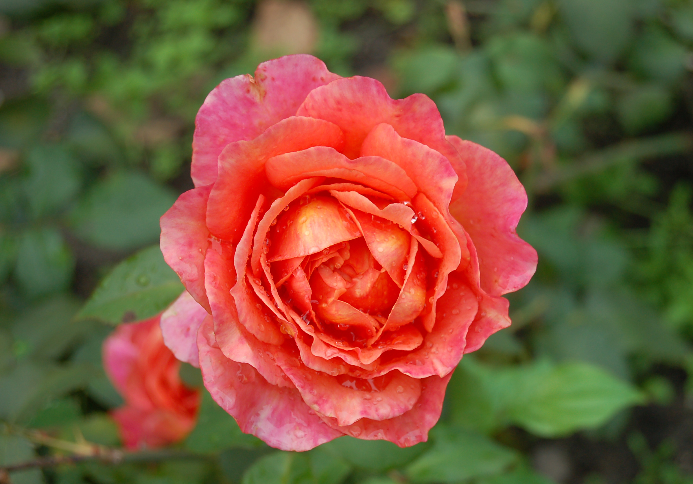 Tee-Hybride Albrecht-Dürer-Rose (Tantau (Hans Jürgen Evers) 1982)